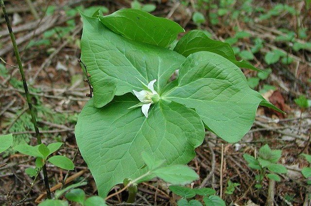 ミヤマエンレイソウ（山梨県釈迦ヶ岳） Trillium tschonoskii (Mt. Shakagatake, Yamanashi, Japan)